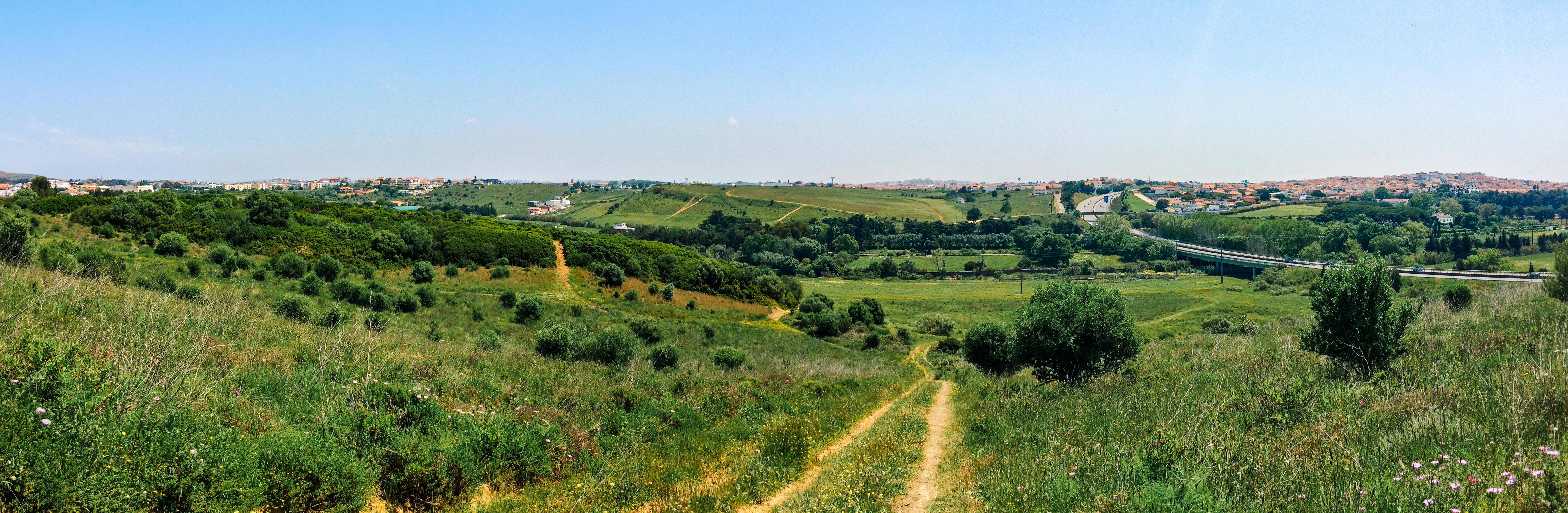 Visão panorâmica do vale da ribeira de Caparide/Manique do Alto de Bicesse, bem como o horizonte da freguesia de São Domingos de Rana.